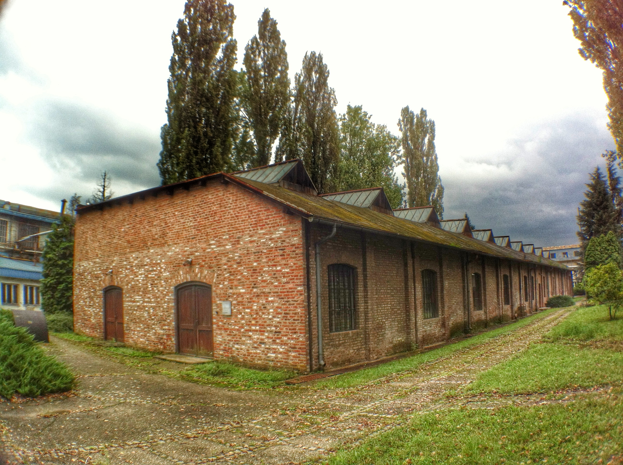 Српски (ћирилица): Радионица се налази у оквиру комплекса "Гоша" ("ФОМ", "Шинска" и "Монтажа"). Тренутно је у њој смештен синдикат ФОМ-а.